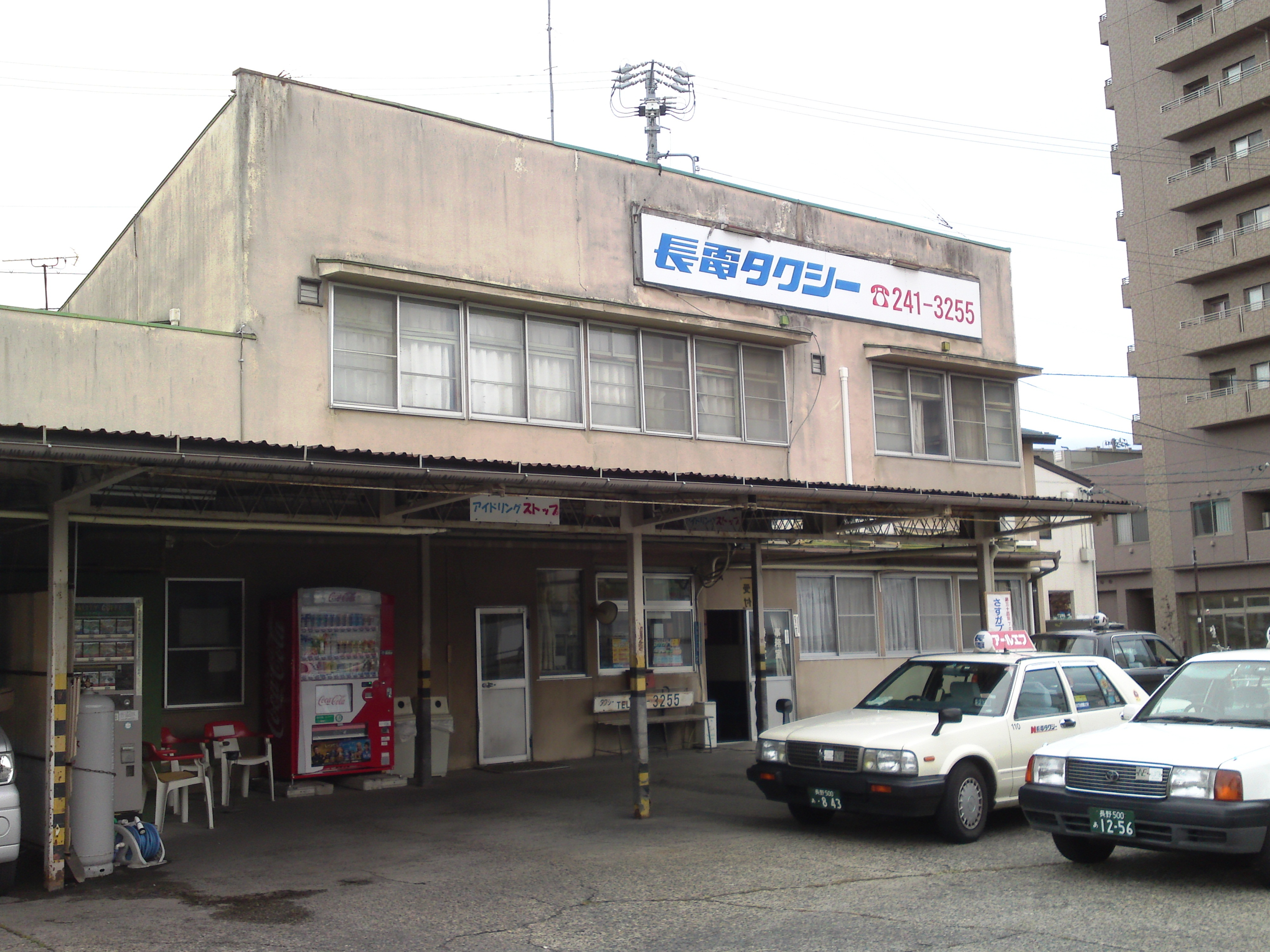 長電タクシー本社・長野営業所